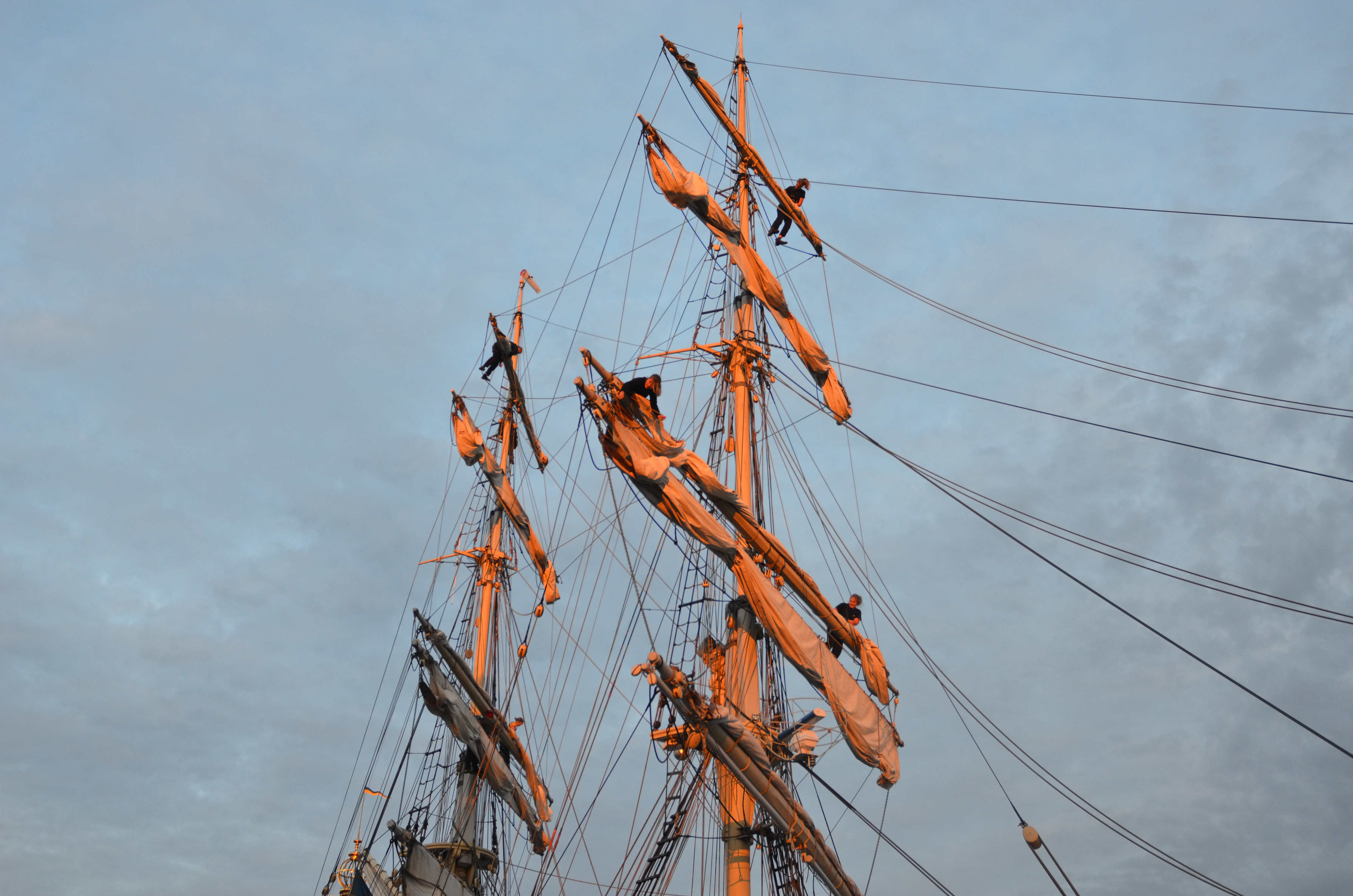 Beslående av segel på briggen Tre Kronor af Stockholm.